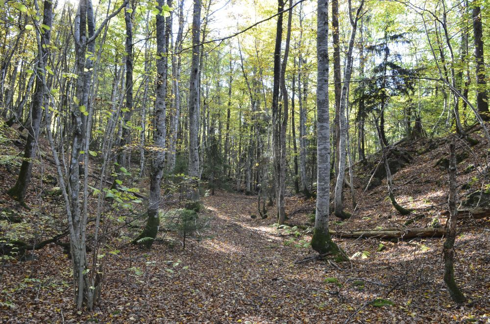 Det er sjelden vi finner rike bestander av den varmekjæra bøken så langt nord som i Hillestadåsen.